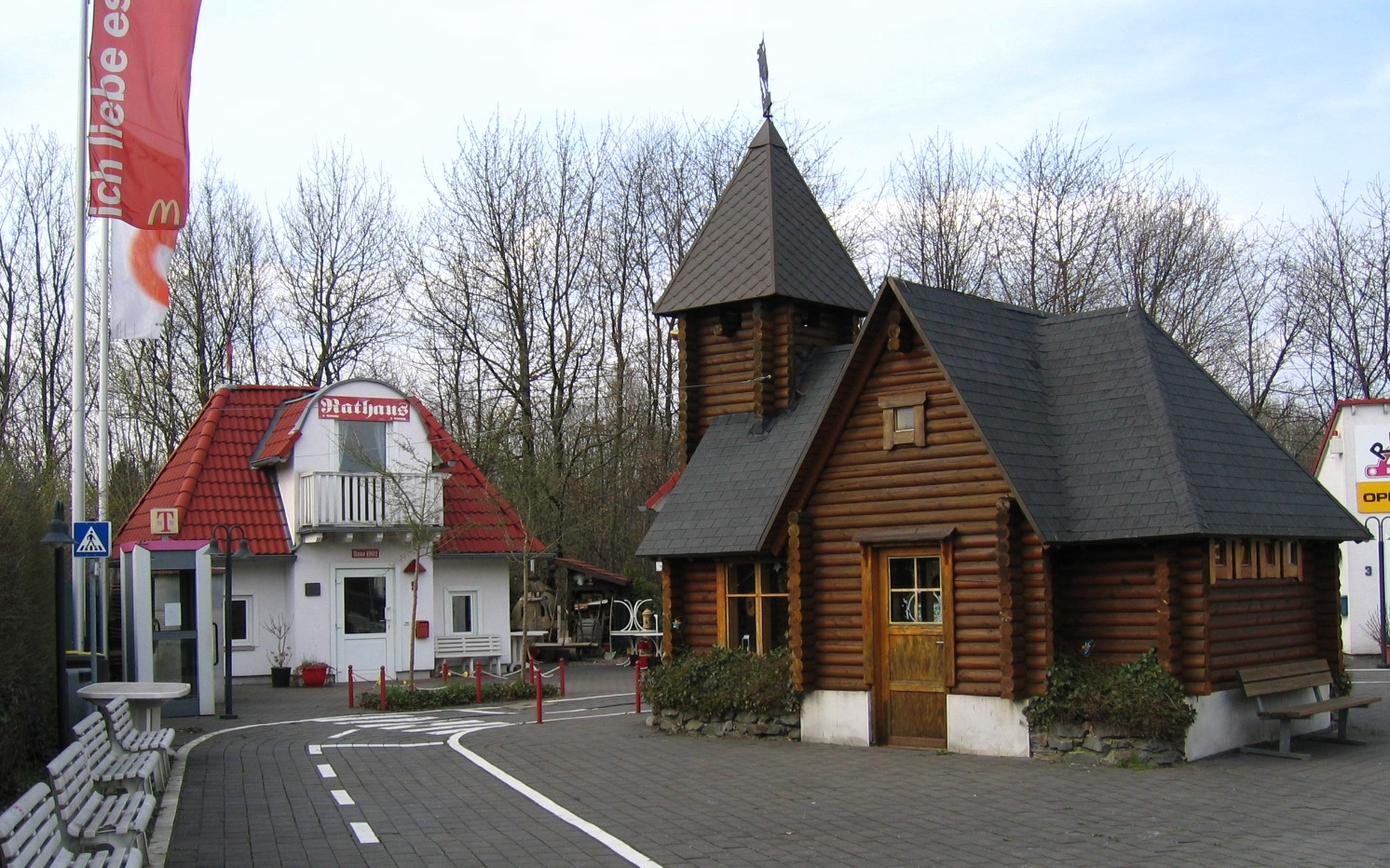 Description: Kinderbrandschutzzentrum Floriansdorf Iserlohn in Iserlohn. Source: selbst fotografiert Date: 21. Apr. 2006 Author: Bubo